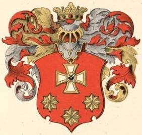 Lohmanni suguvõsa aadlivapp